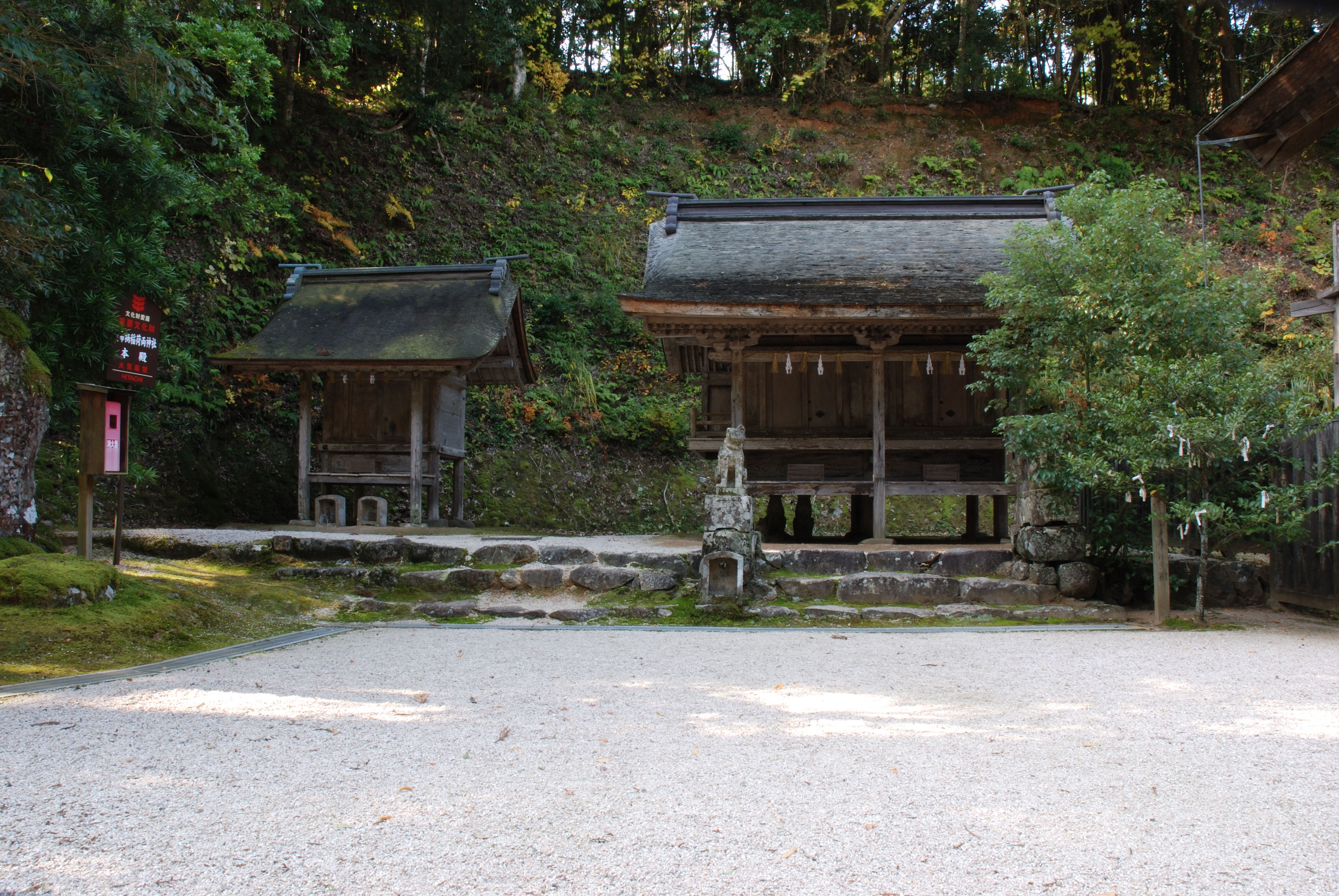 Kamosu jinja keidaisha2